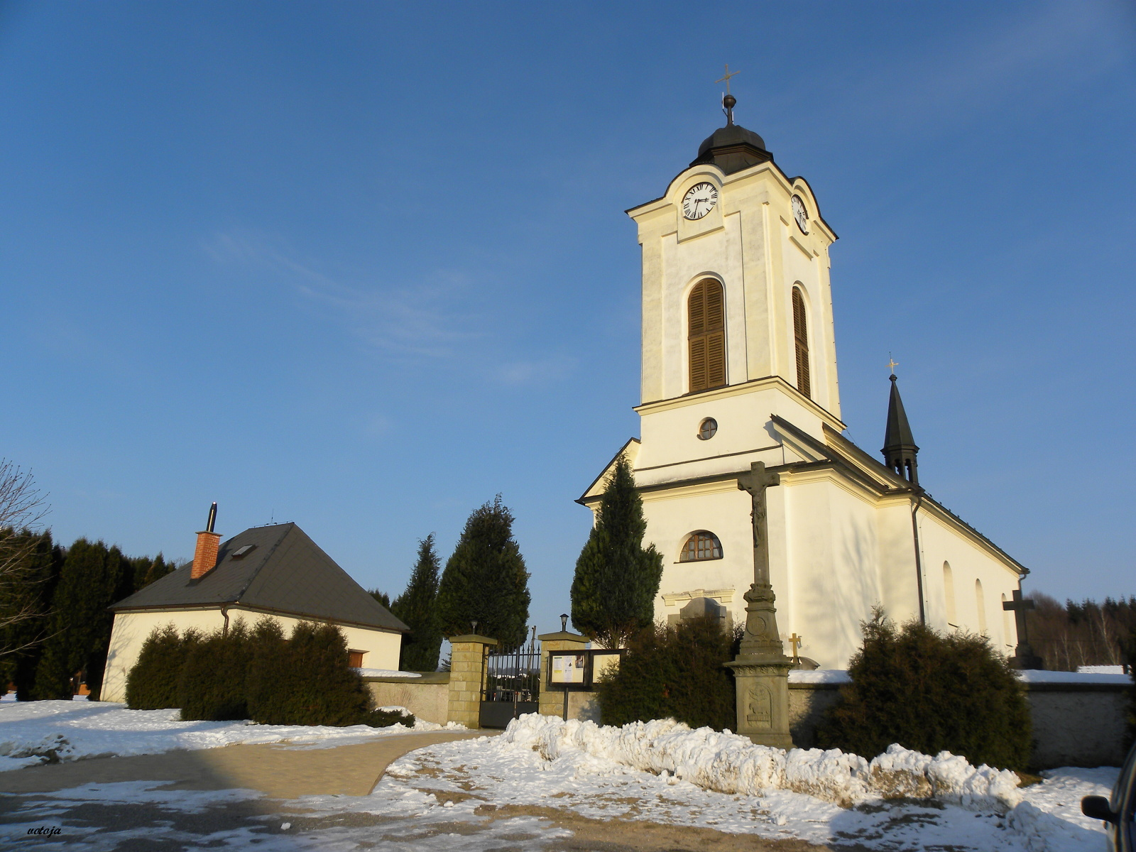 Kostel sv. Víta (České Libchavy), České Libchavy